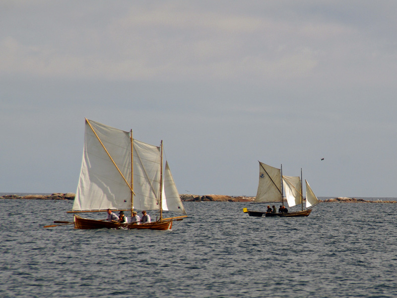 Postrodden 2011